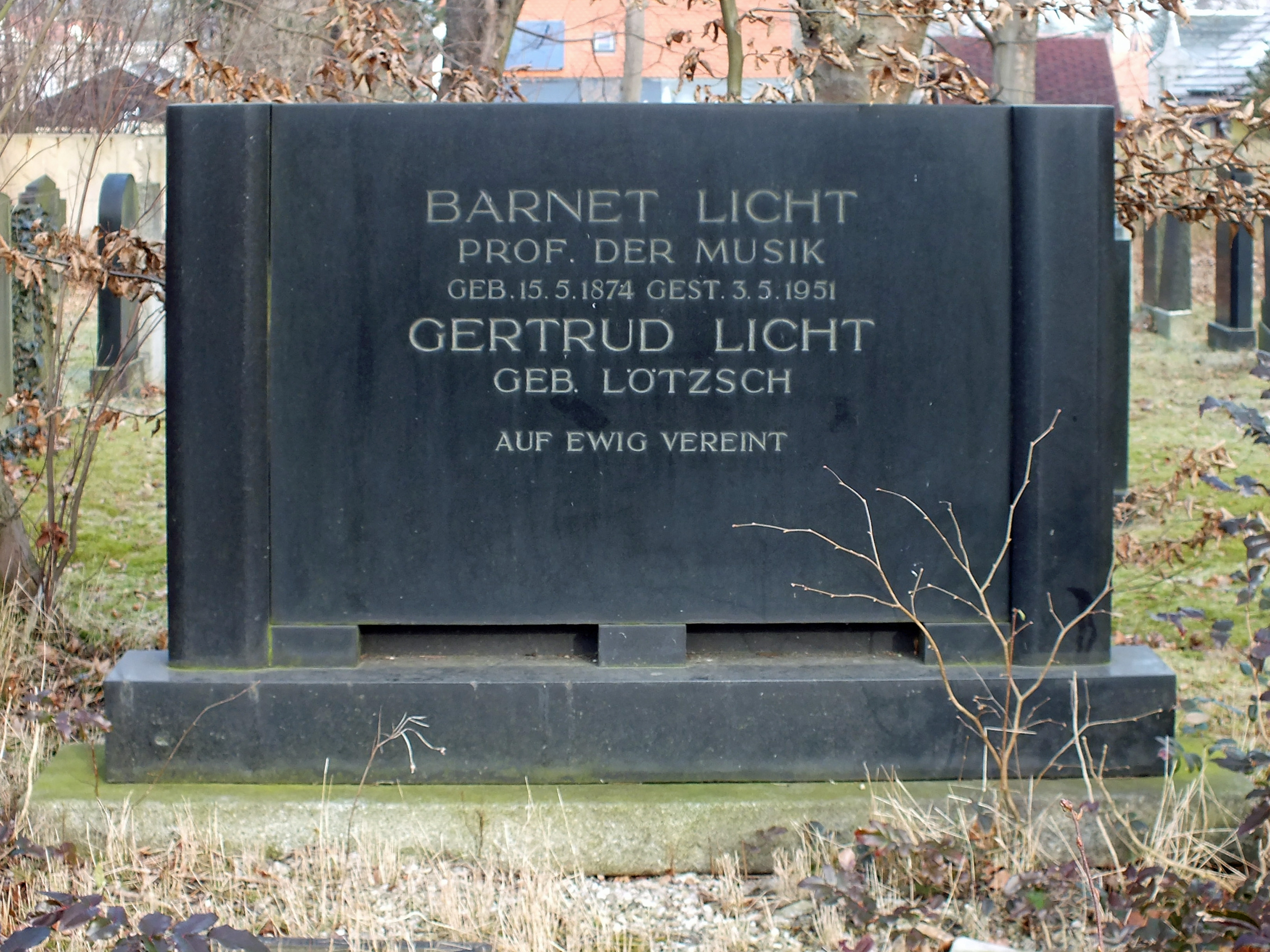 Das Grab Barnet Lichts auf dem Neuen Israelitischen Friedhof in Leipzig